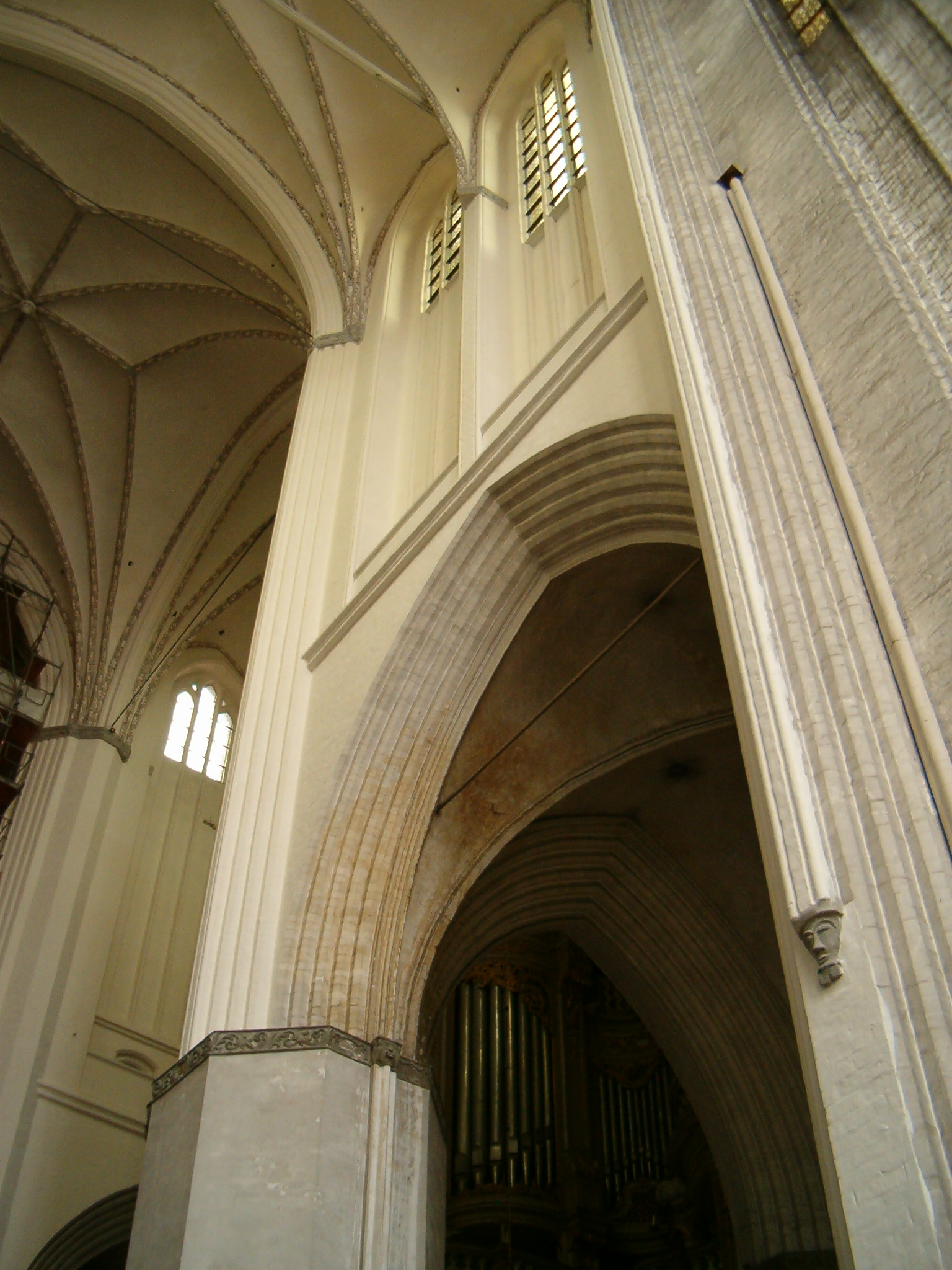 Blick aus dem nördlichen Querhaus der Rostocker Marienkirche